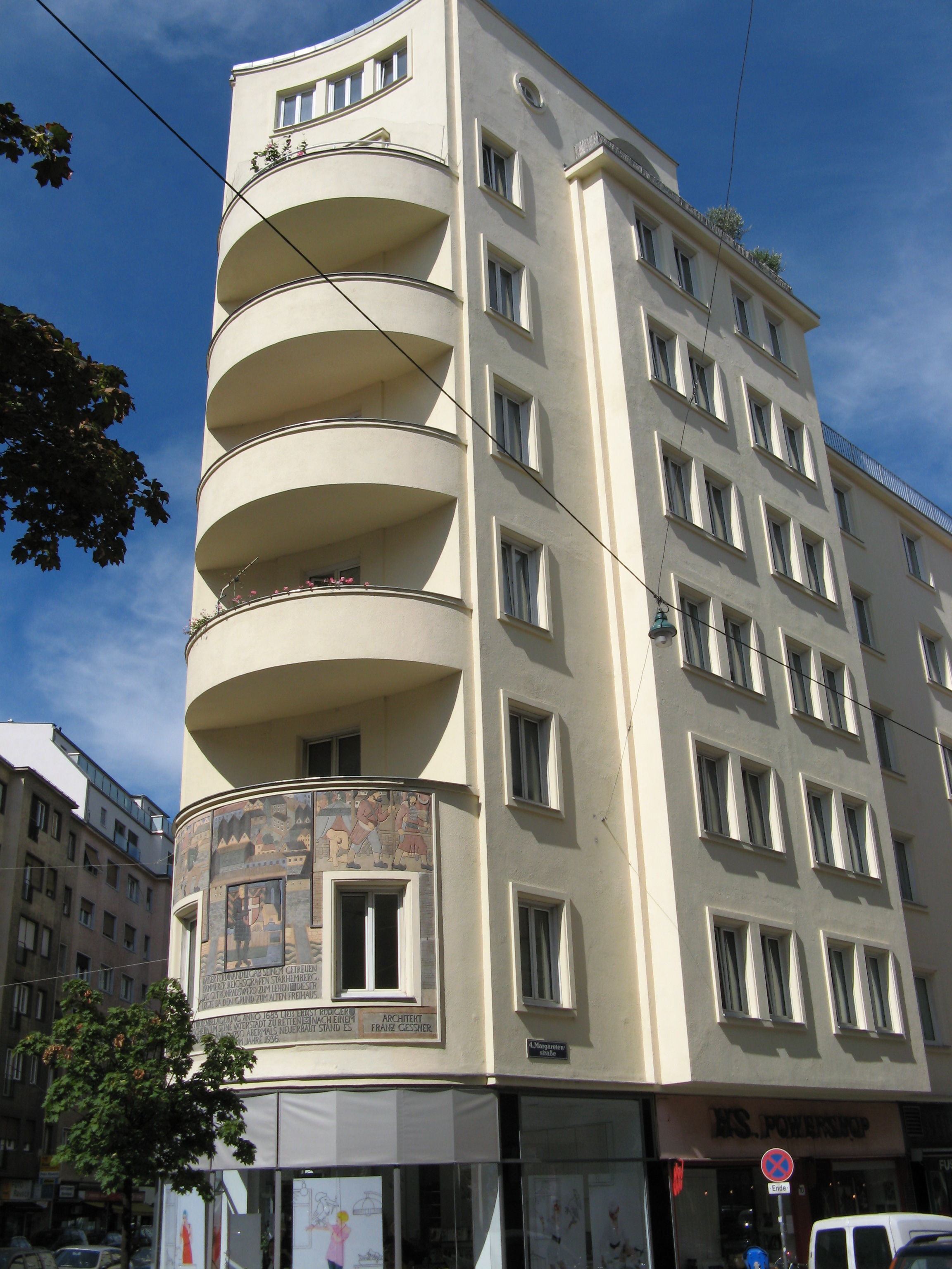 Operngasse 25 (1936) von Franz Gessner, Wien-Wieden